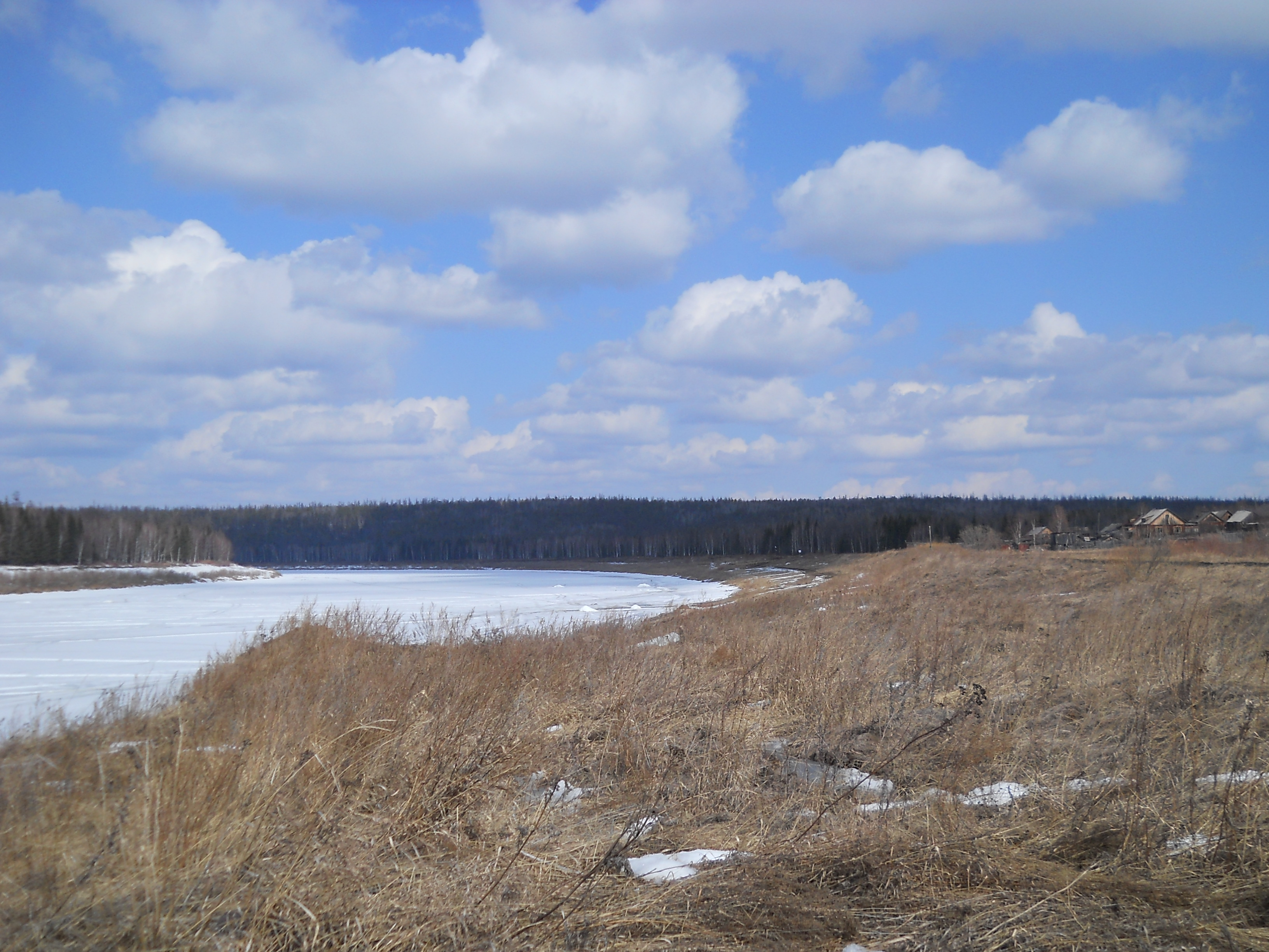 Россия,Подкаменная Тунгуска.